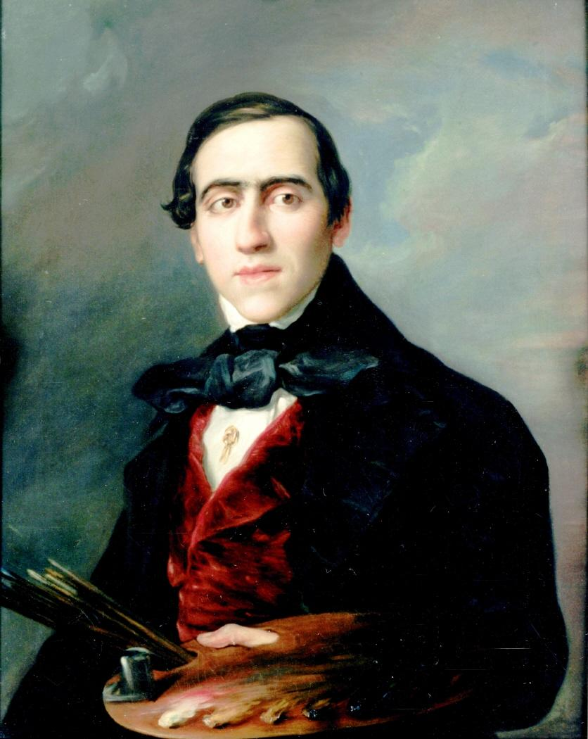 Retrato del pintor español Nicolás Gato de Lema (1820-1883), que fue uno de los discípulos predilectos del pintor Vicente López Portaña.